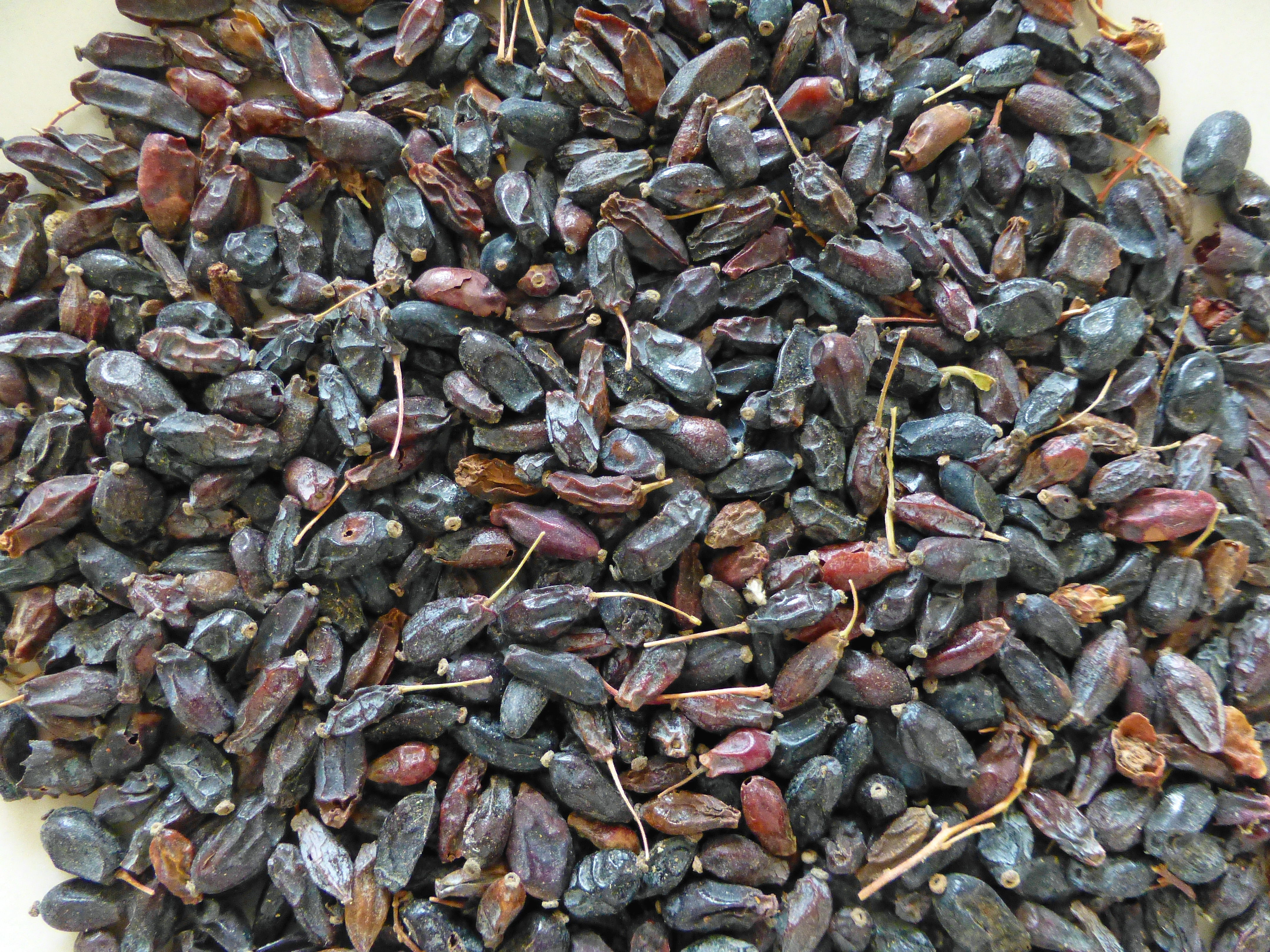 Épine-vinette séchée d'Ouzbékistan, très utilisée comme condiment, notamment dans la confection du plov, plat national